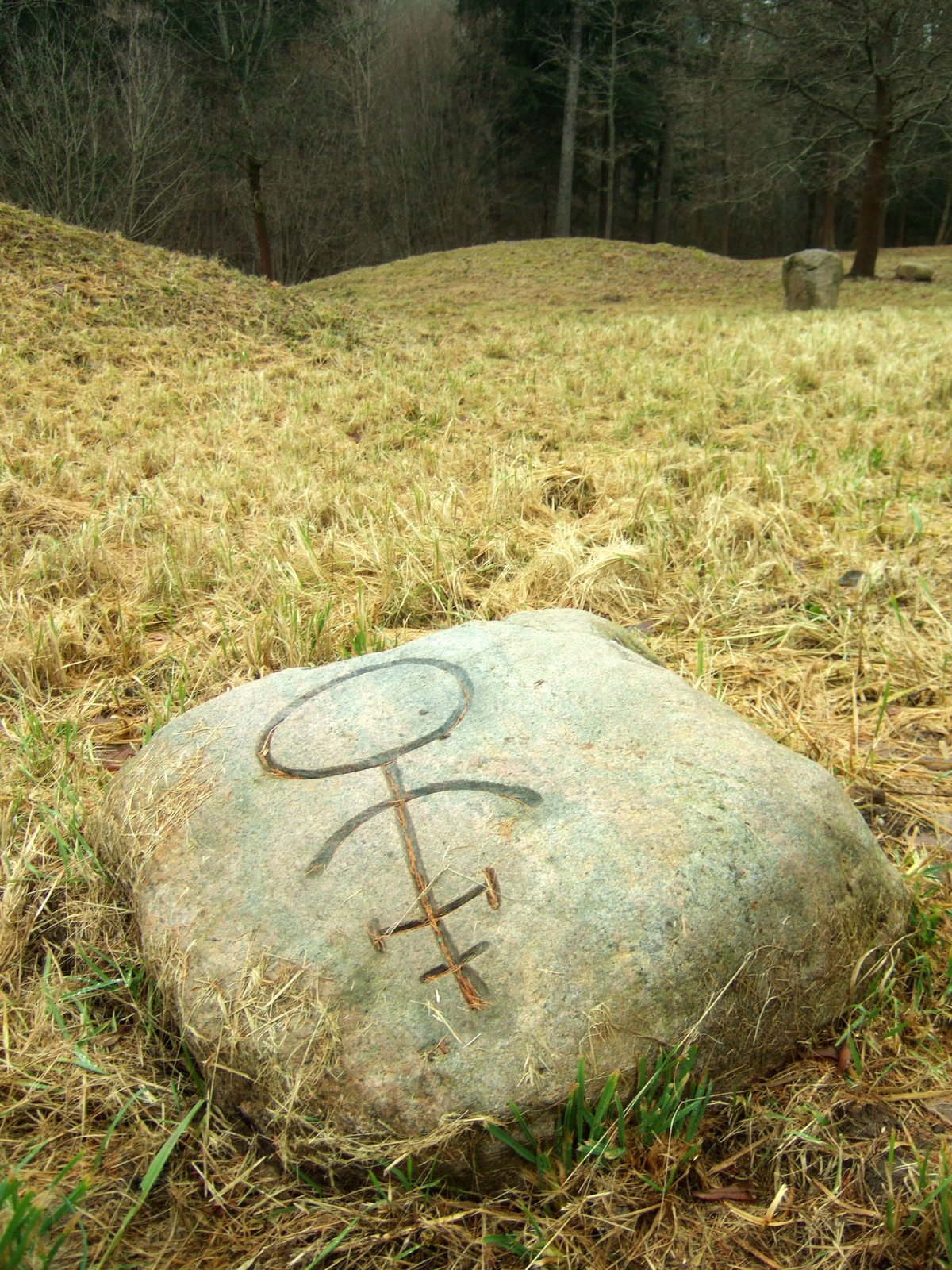 Akmuo Naujosios Vilnios pilkapyne, vaizduojantis Salako akmenį